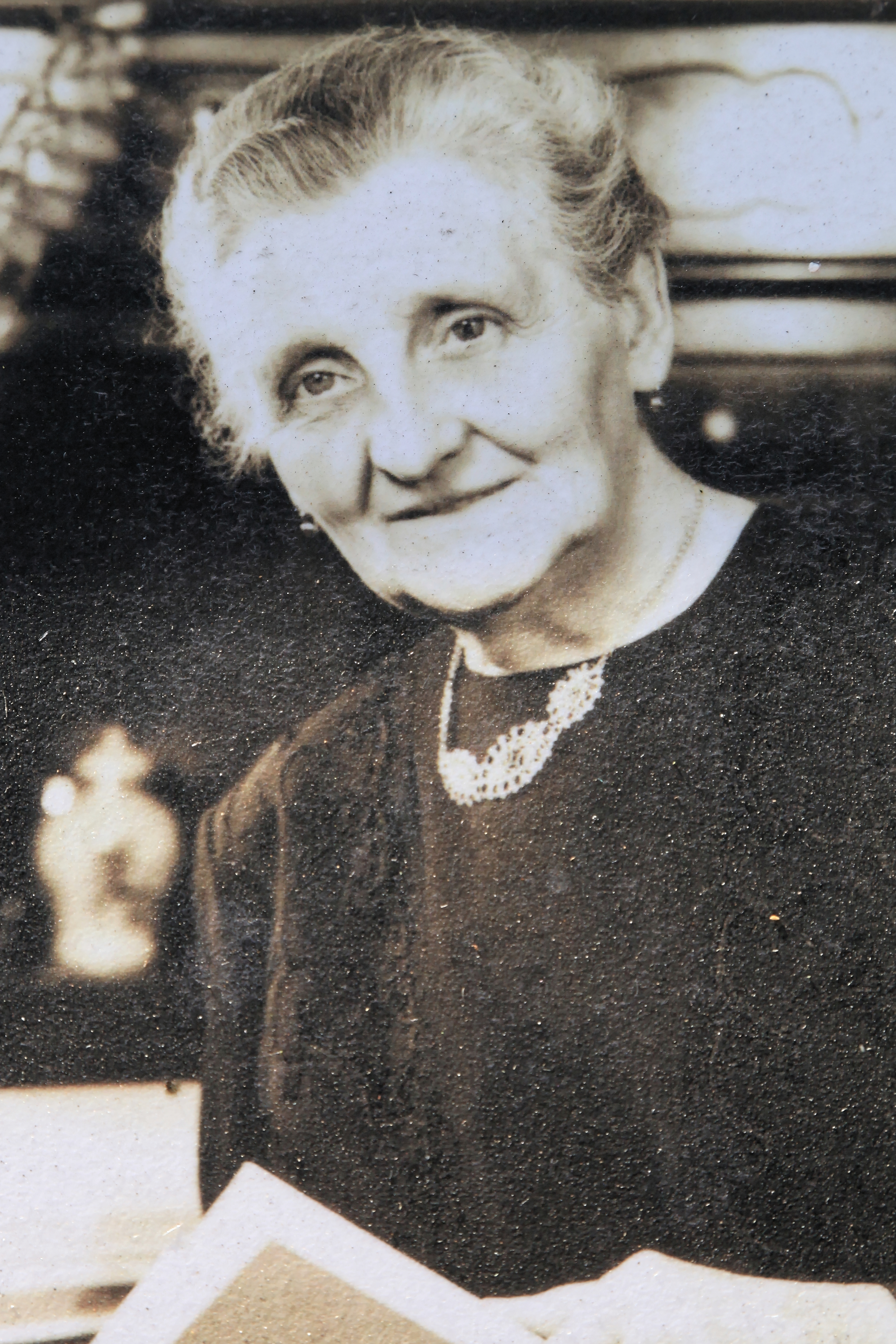 Wilhelmine-Siefkes-Platz, Dreieck von Fabriciusstraße, Großer Oldekamp und Marienstraße in Leer (Ostfriesland)